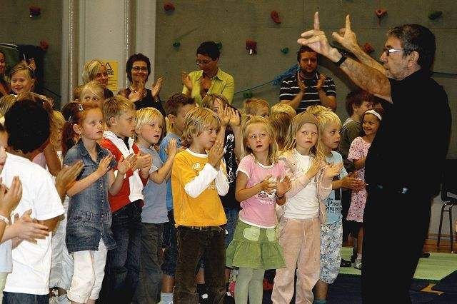 Salvador Pelejero dirigiendo a un grupo de alumnos de la Kastellet Skole de Oslo